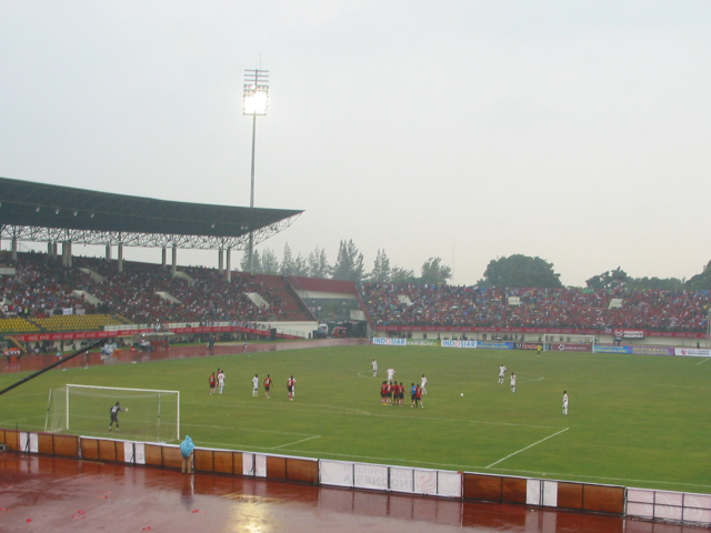 Laga perdana LPI antara Solo FC dan Persema Malang di Stadion Manahan, Solo